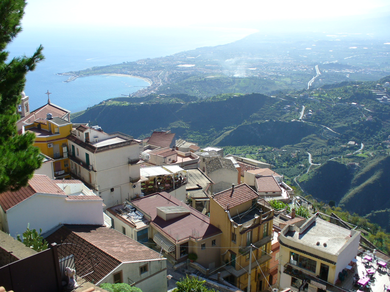 Castelmola é uma cidadezinha fundada no século VIII e localizada no topo do Monte Tauro.